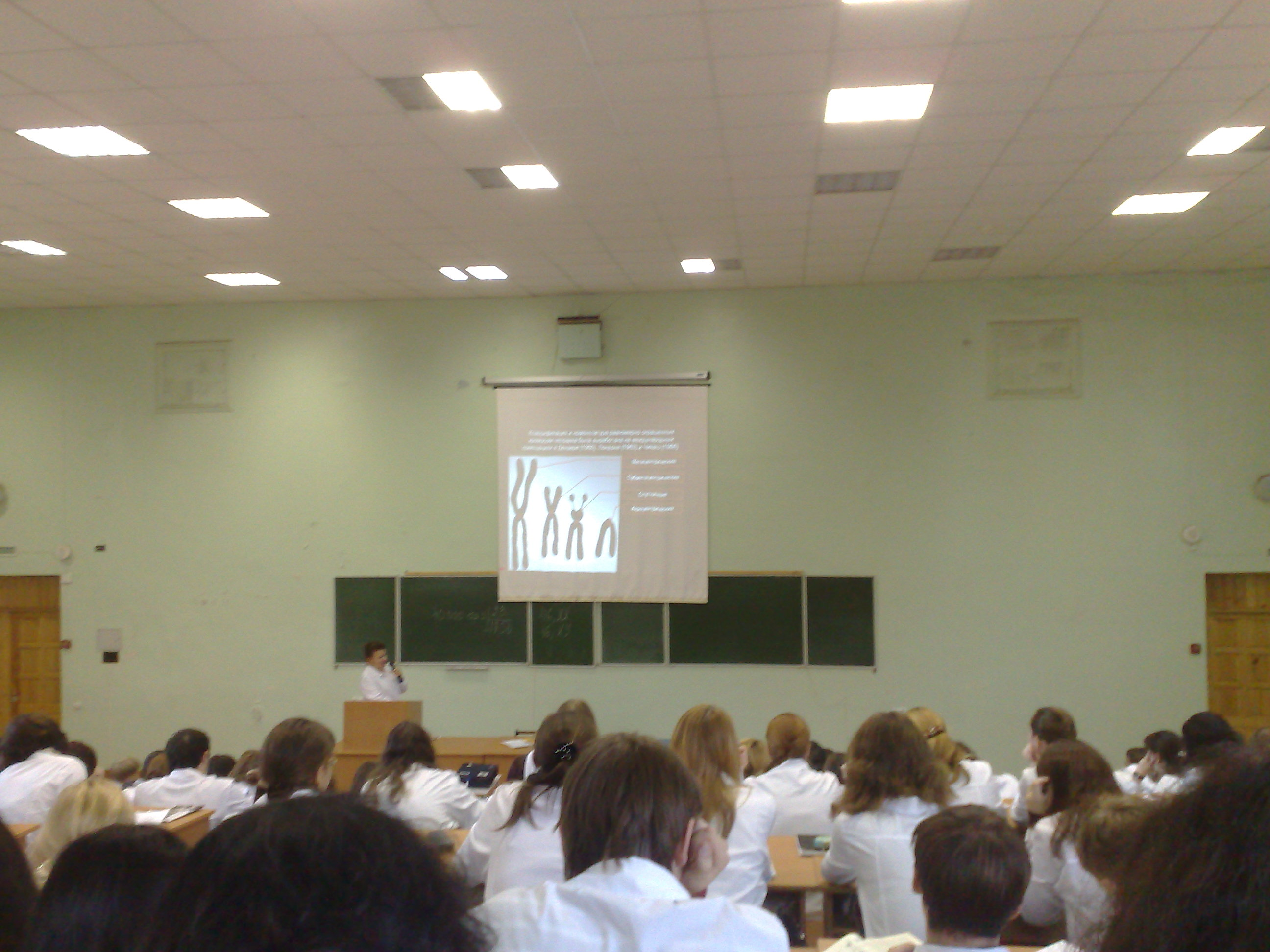 Лекция по биологии